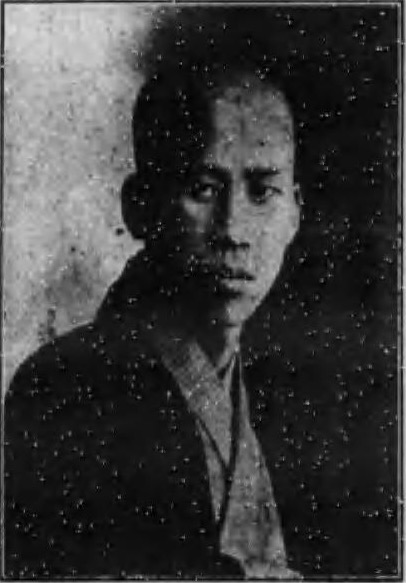 1923年の写真。